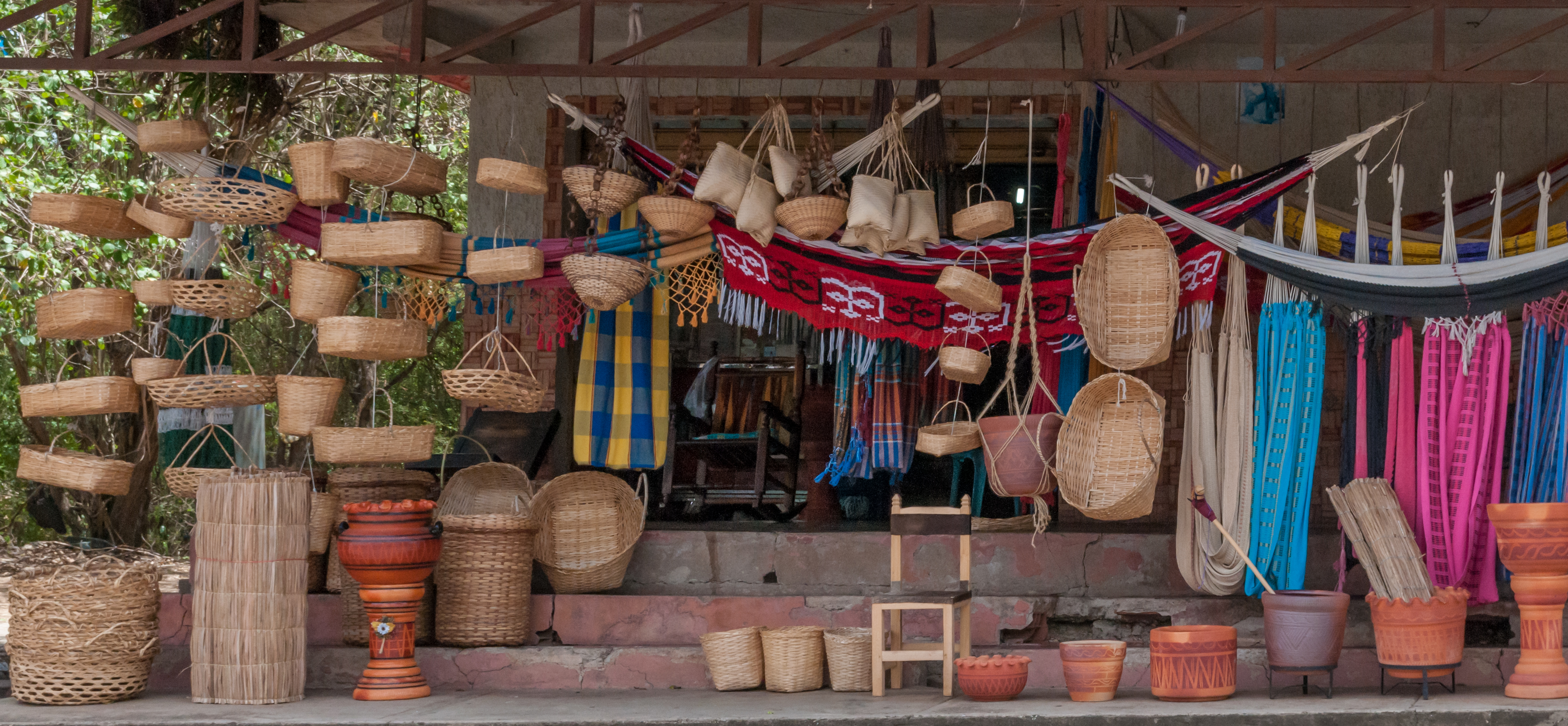 Tienda de cestas e macas en Isla Margarita